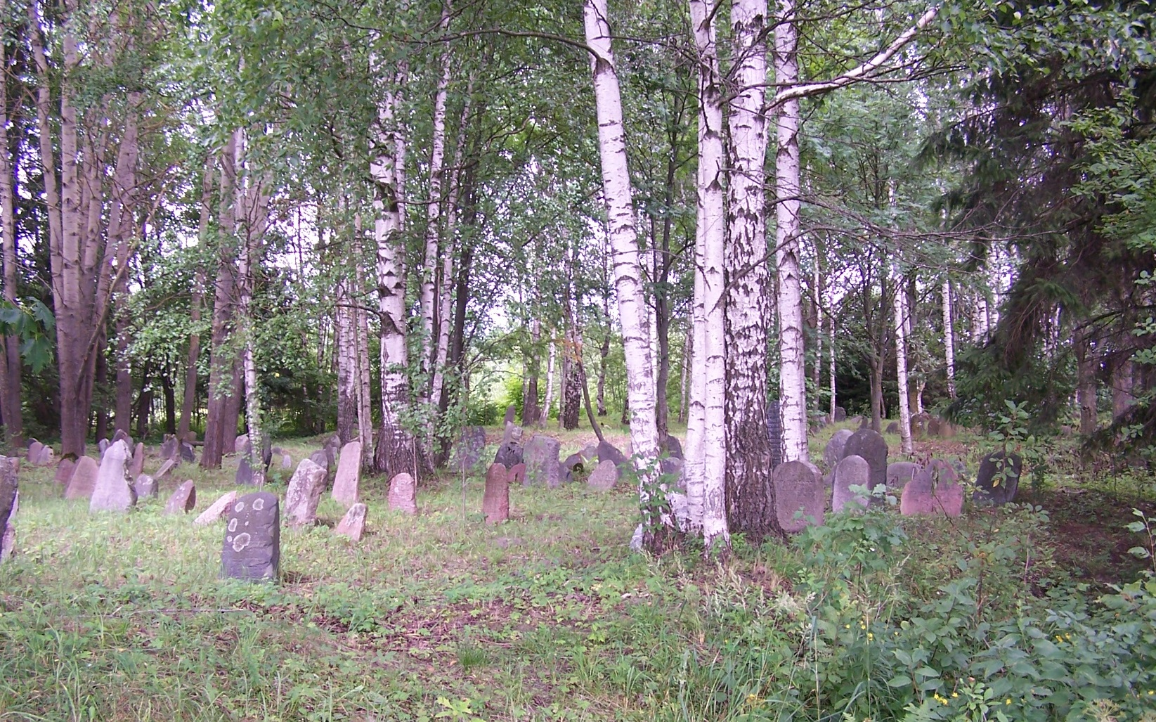 Subačiaus žydų senosios kapinės